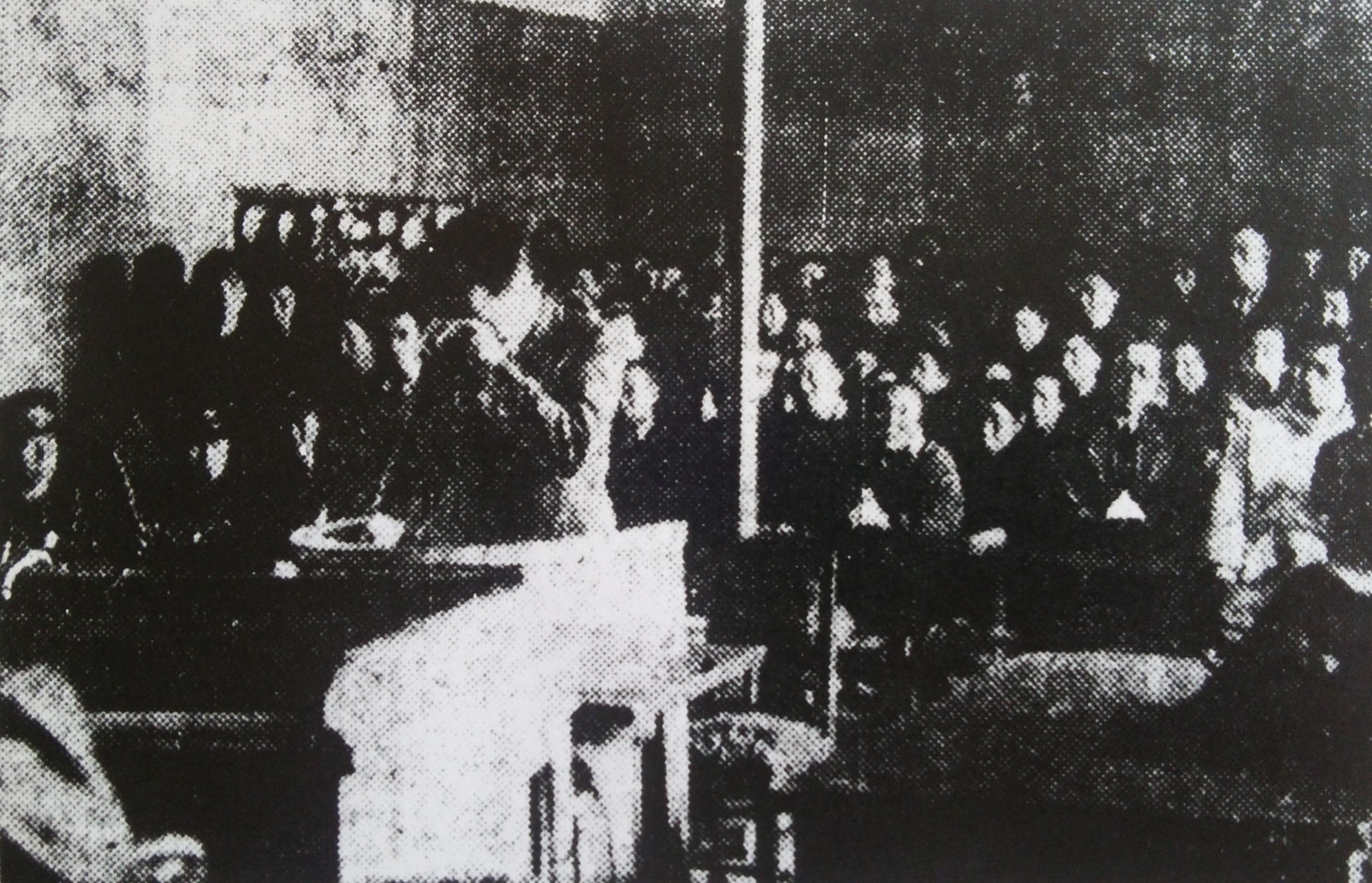 弘前大学教授夫人殺人事件一審判決日、無罪判決に感涙する那須隆。傍聴席の△印の人物は松永藤雄。